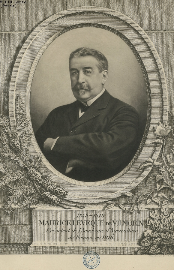 Maurice de Vilmorin (1849-1918)